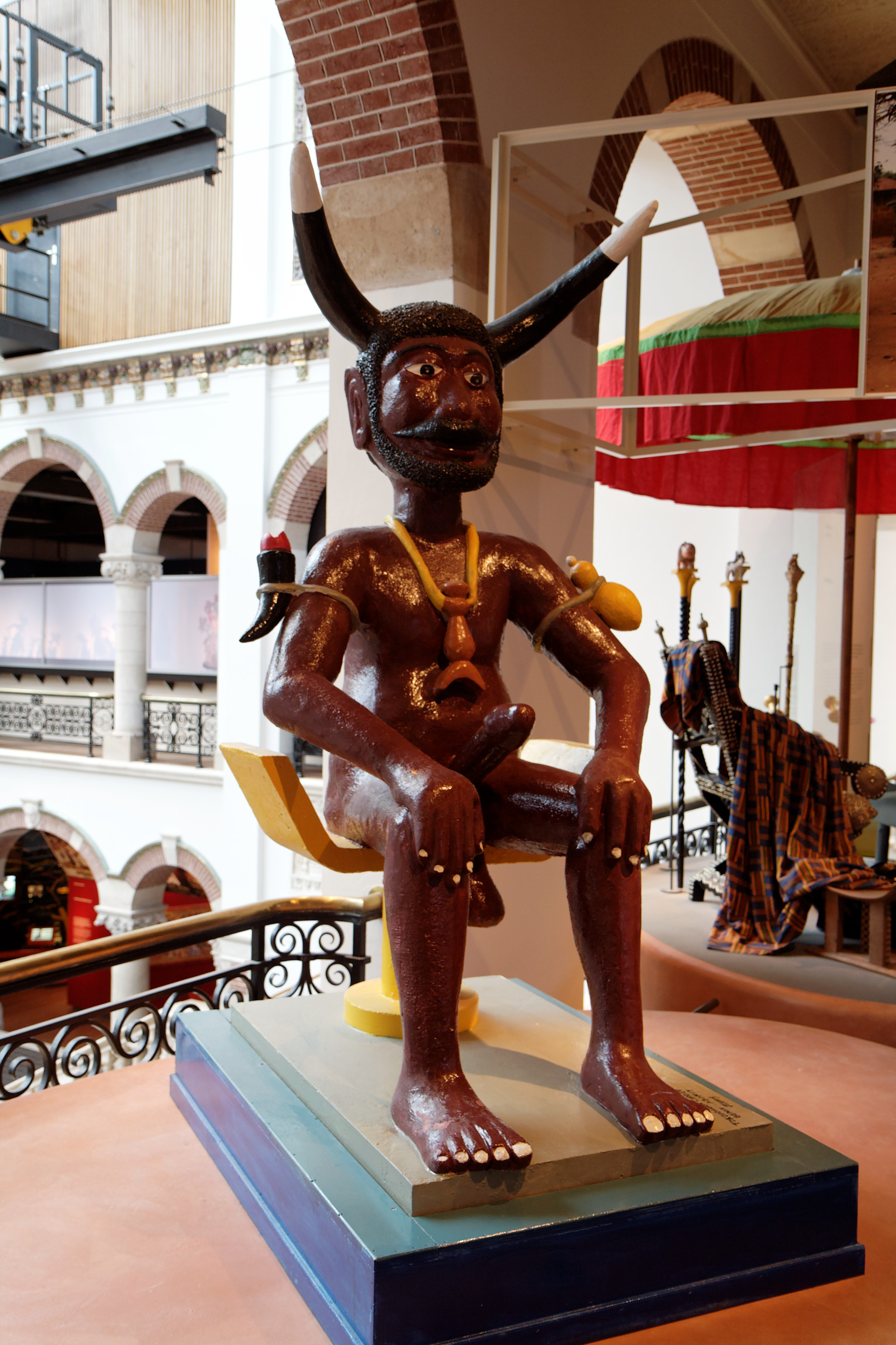 Legba (6265-1) 090612-113005_ 0308_350D_raw